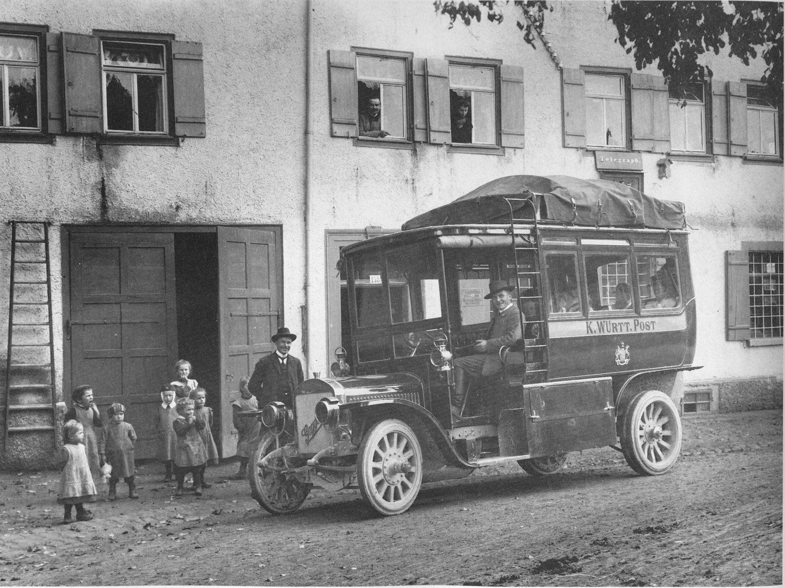 Postbus der Königlich Württembergischen Post in Rosenfeld bei Oberndorf am Neckar.